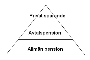 Pension